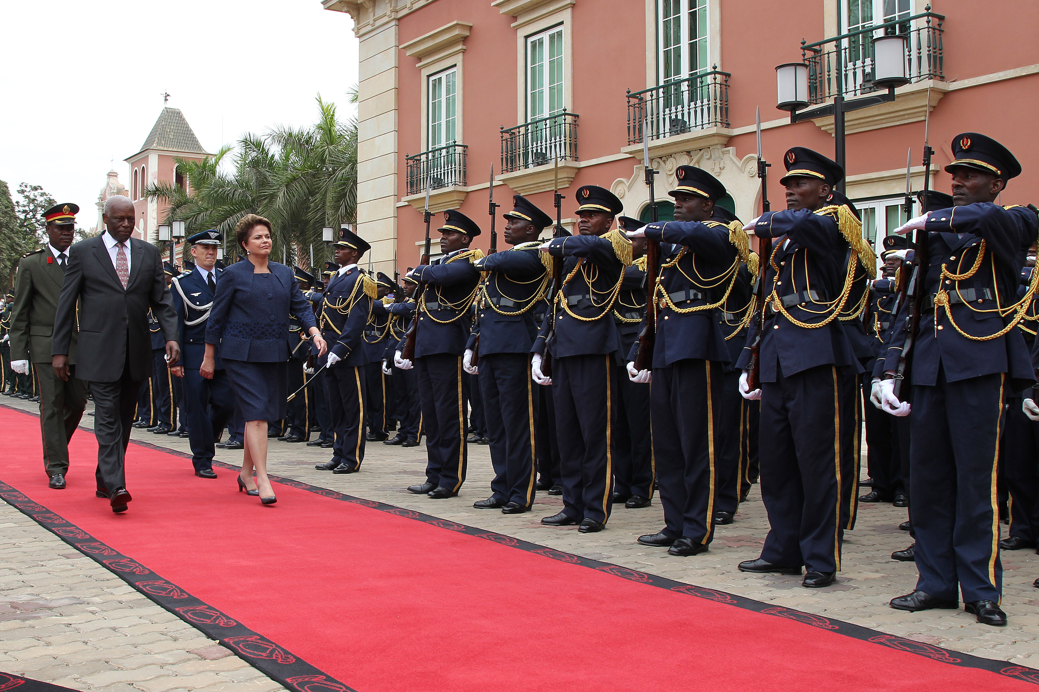 Presidenta Dilma Roussef, durante cerimônia Oficial de chegada a Luanda. (Luanda-Angola, 20/10/2011)